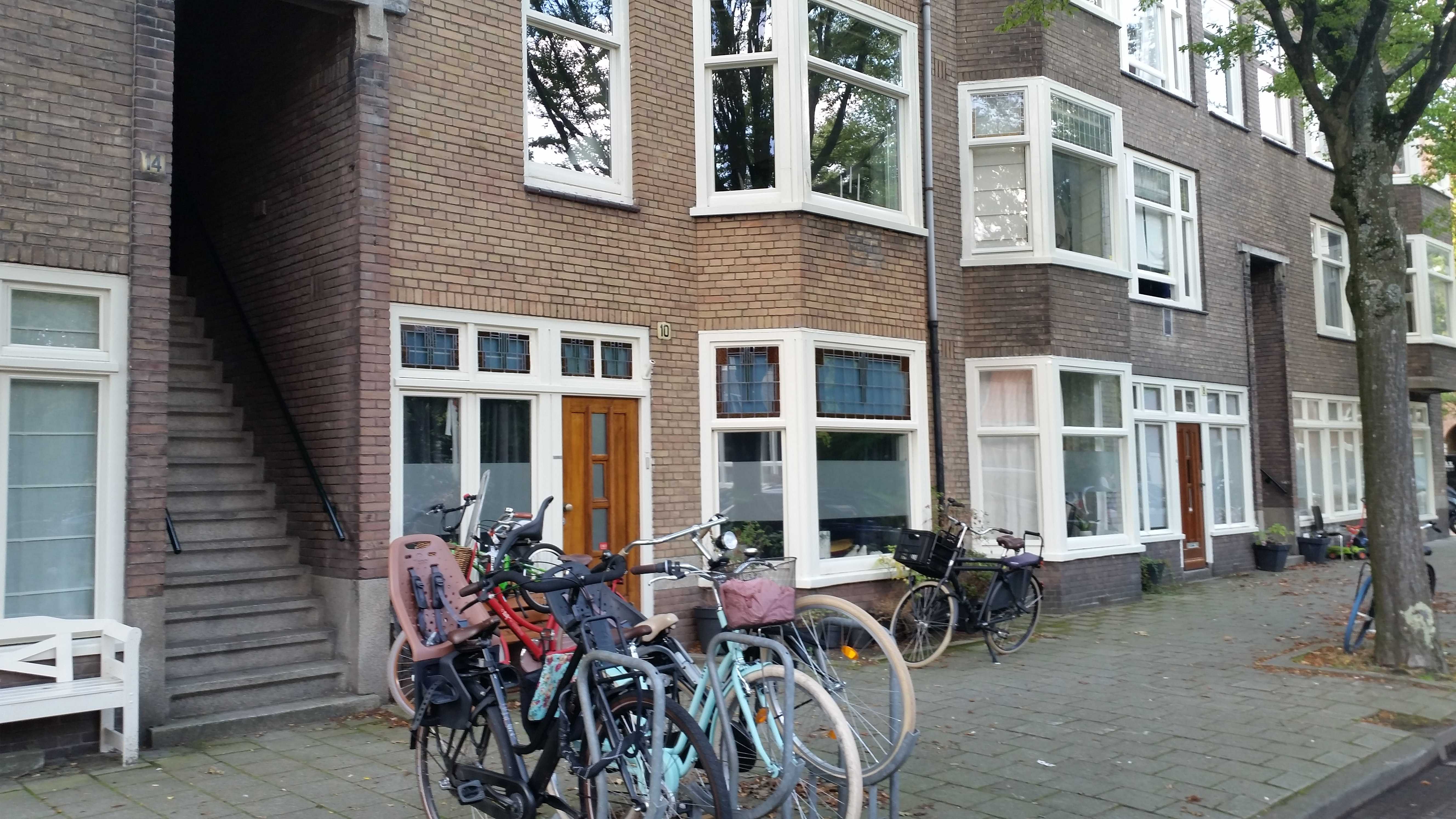 Wodanstraat, Amsterdam